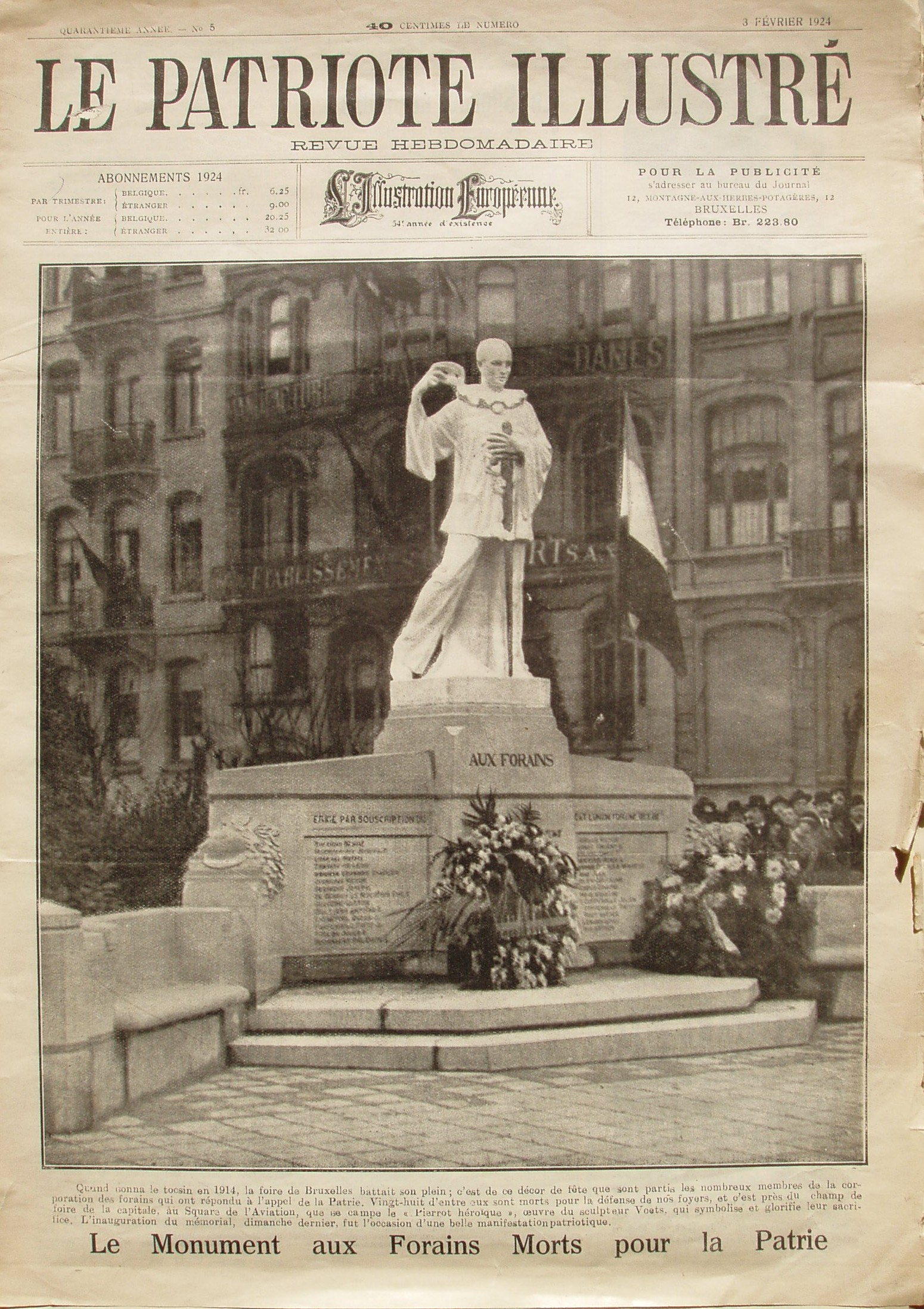 Couverture du Patriote illustré, revue hebdomadaire